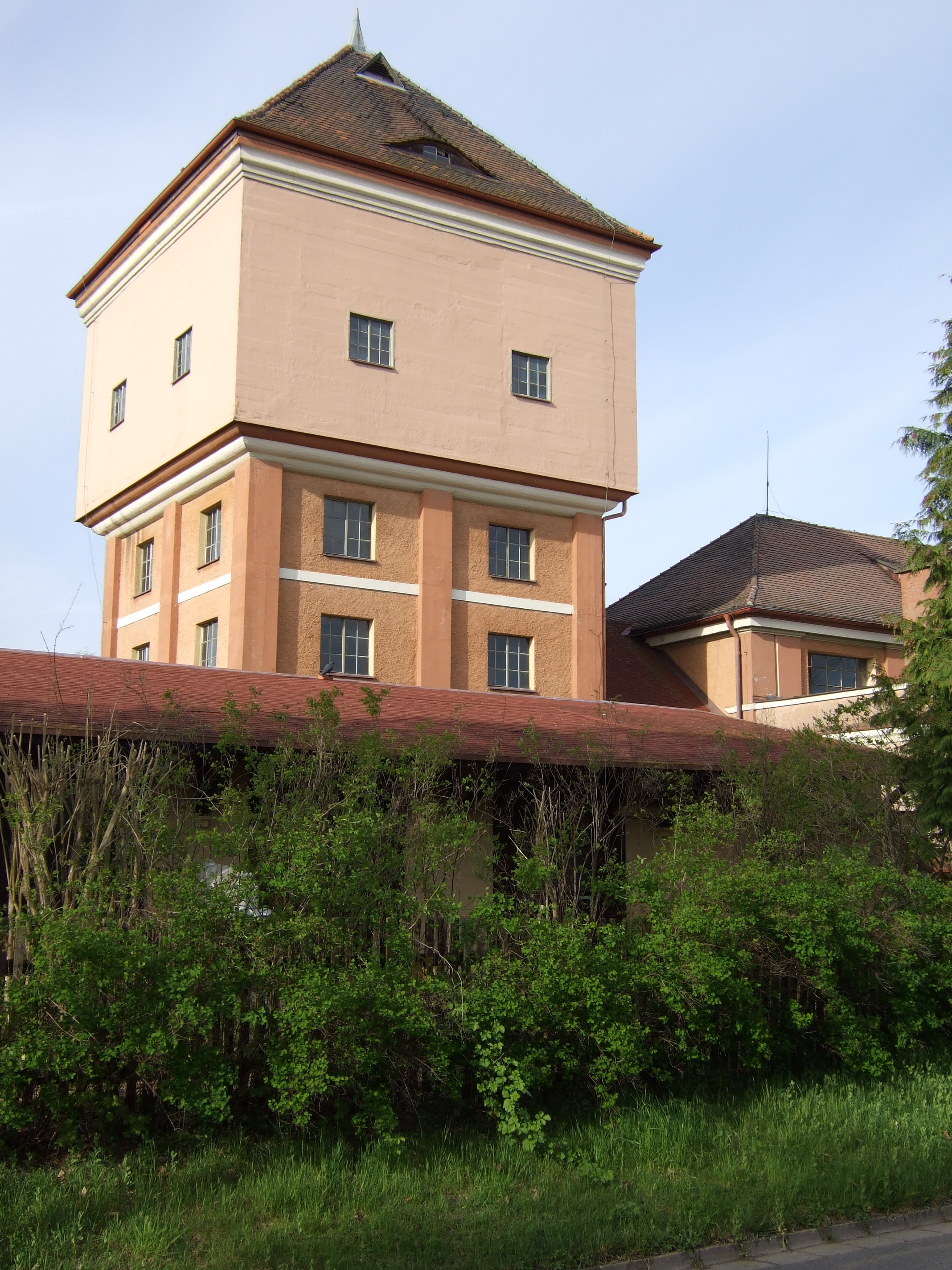 Wasserturm des ehemaligen Bahnbetriebswerks Kirchenlaibach